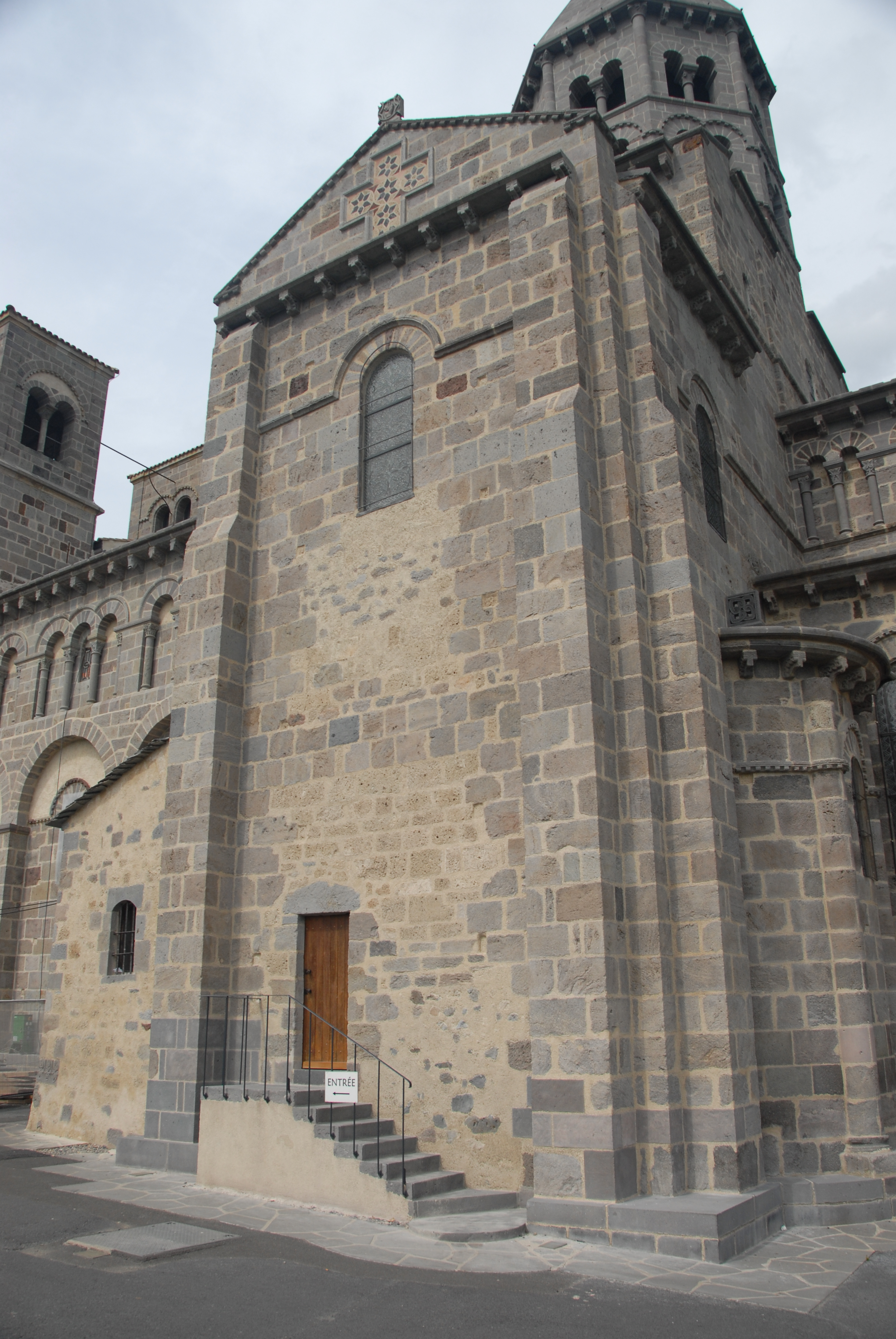 St.-Nectaire, Siebelwand südl. Querhausarm, von SO